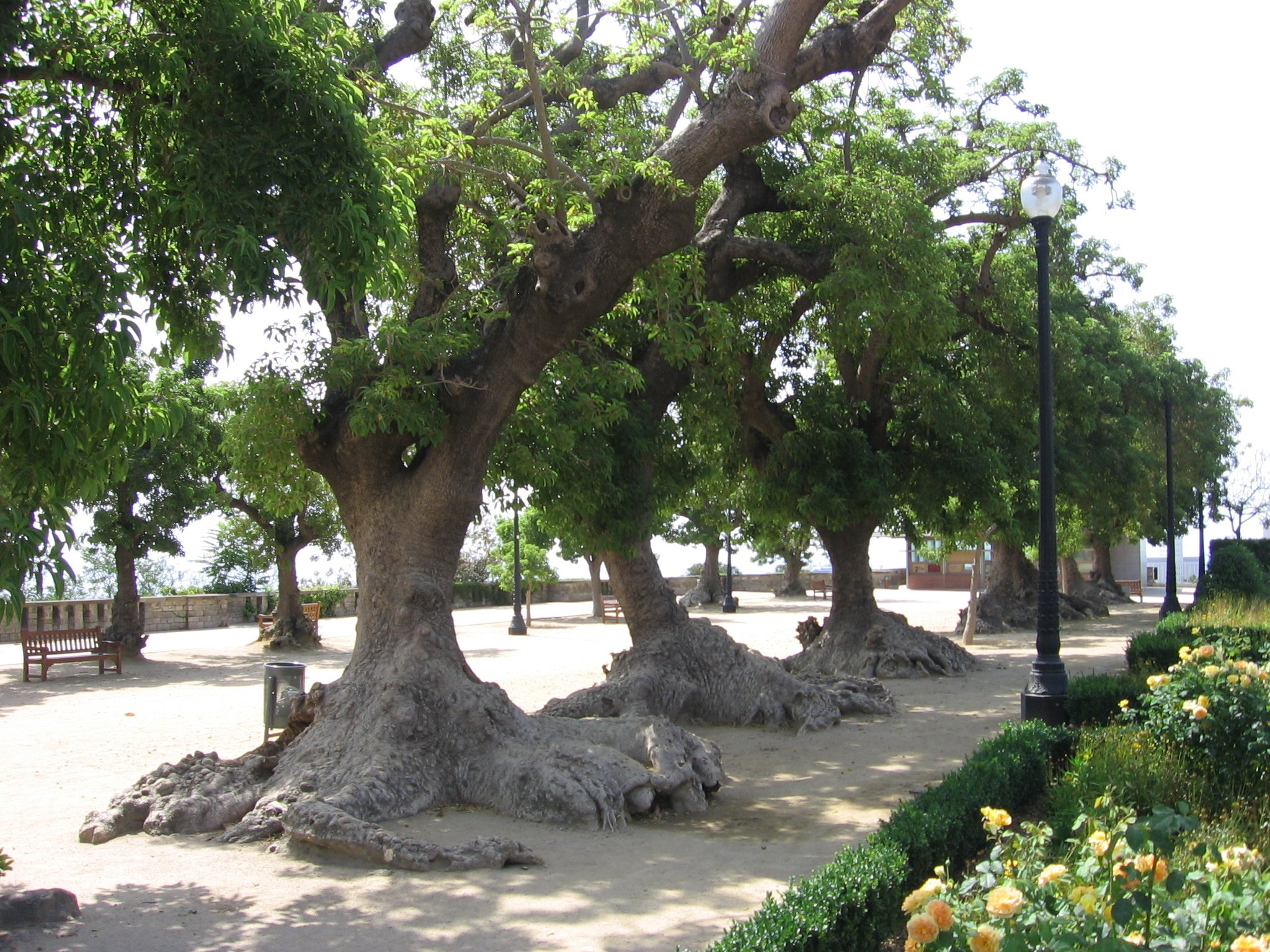 Jardines de Miramar, Montjuïc, Barcelona.